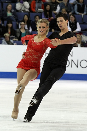 Madison HUBBELL and Zachary DONOHUE at the 2011 Skate America